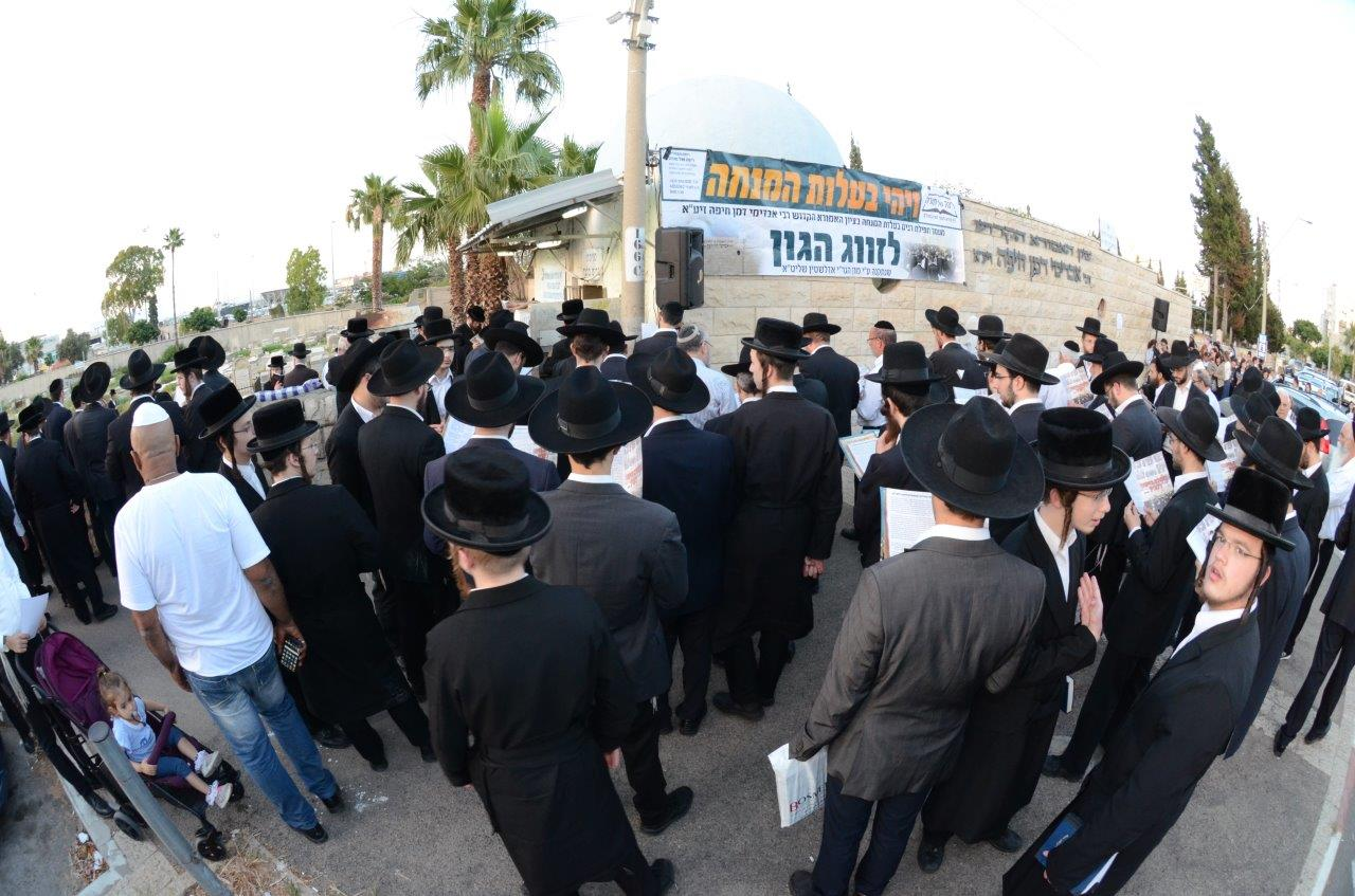 תפילת השל"ה בציונו של רבי אבדימי דמן חיפה בערב ראש חודש סיוון